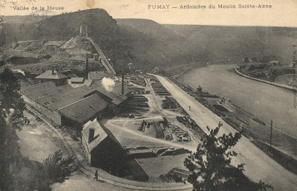 ardoisière du Moulin Sainte-Anne à Fumay (08) vers 1900